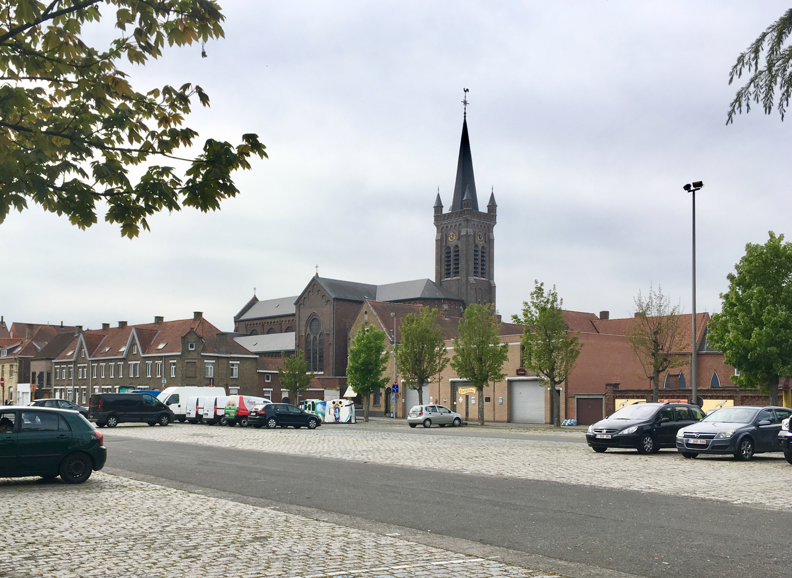 De Onze-Lieve-Vrouwemarkt met Onze-Lieve-Vrouwekerk op de achtergrond. Dit is het voornaamste plein van de wijk Krottegem. (anno 2017)